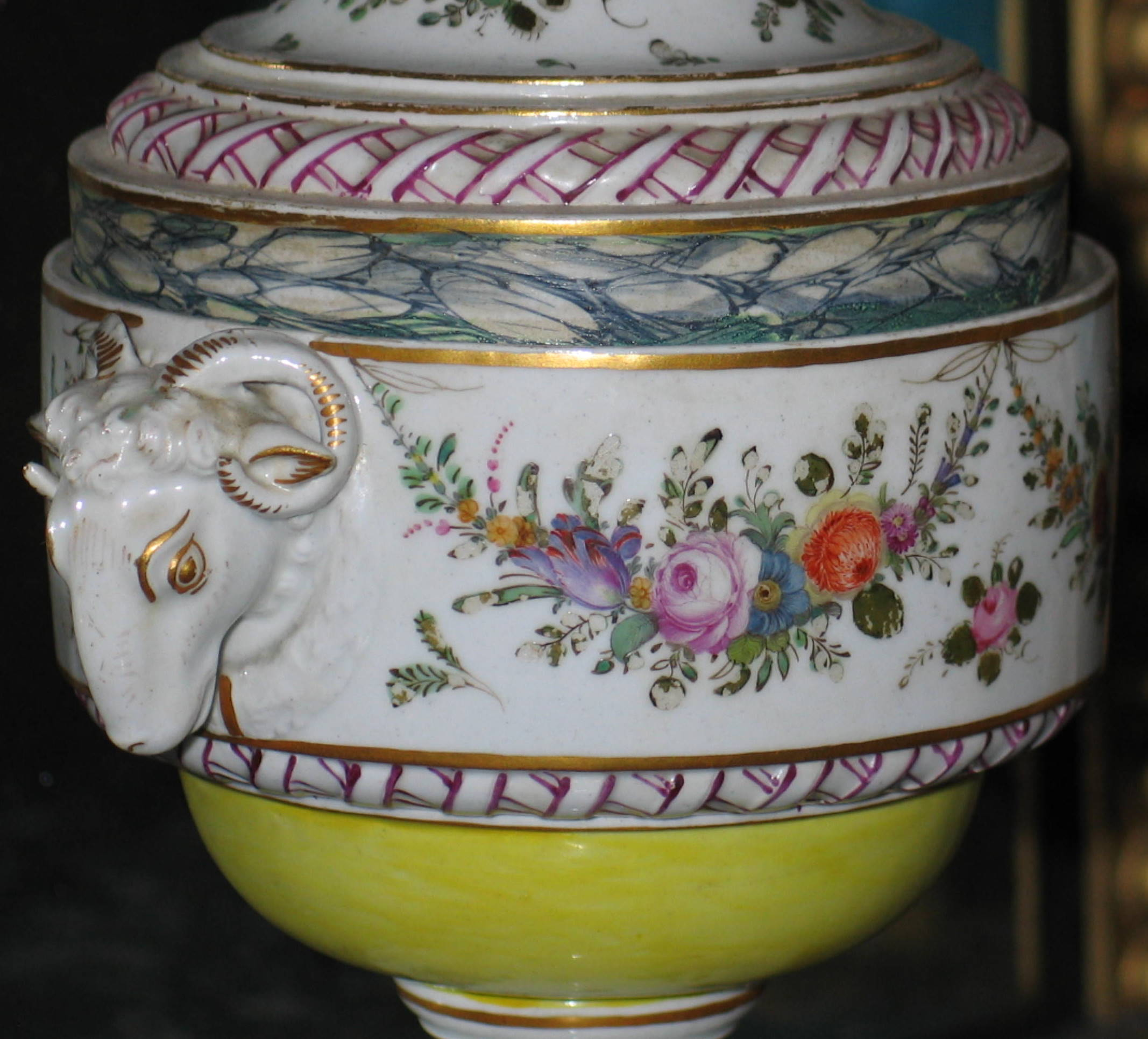 Detail Kastanjevaas (?), met ramskop, gemaakt rond 1780 in de Loosdrechtse porseleinfabriek van Joannes de Mol